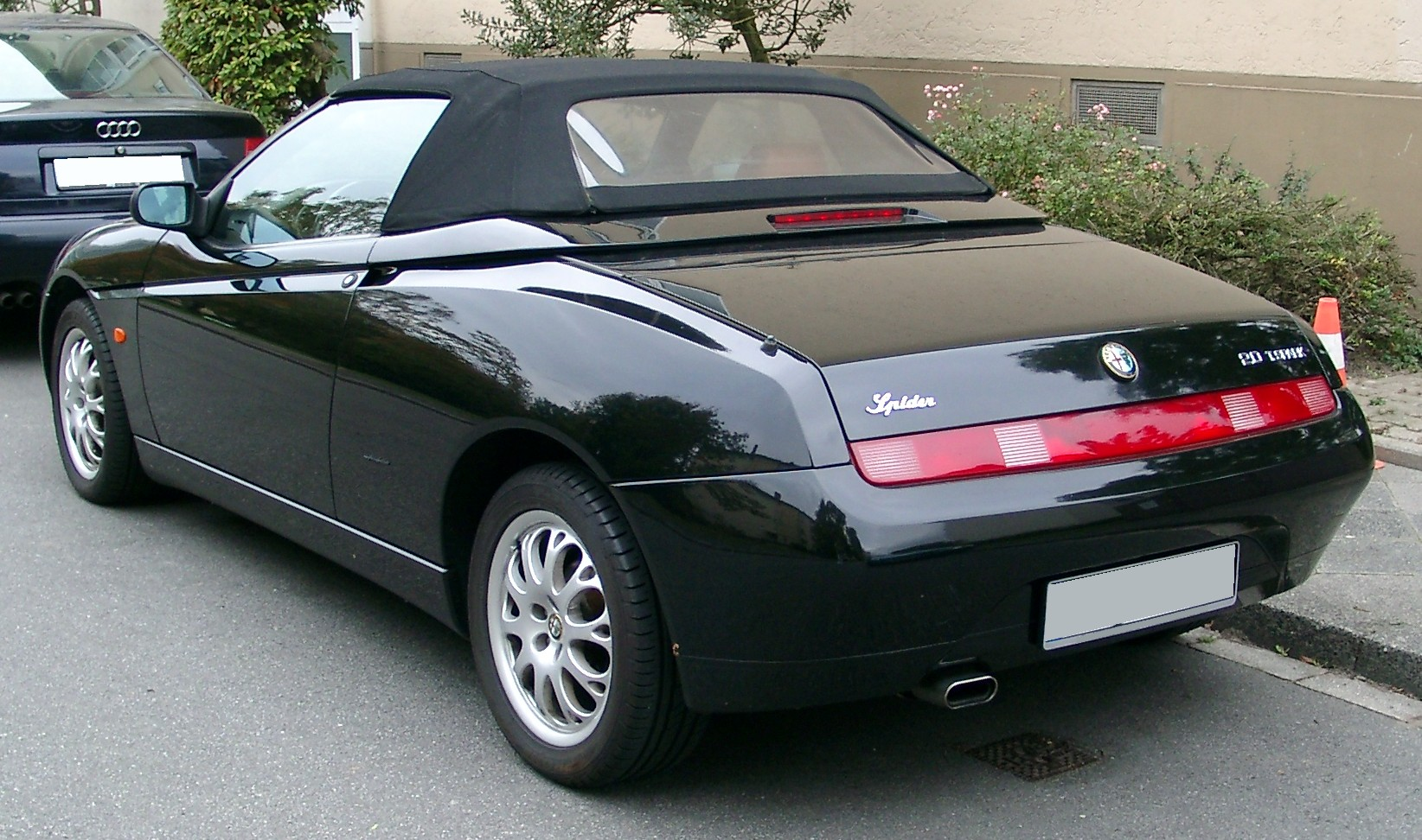 Alfa Romeo Spider, 5. Generation